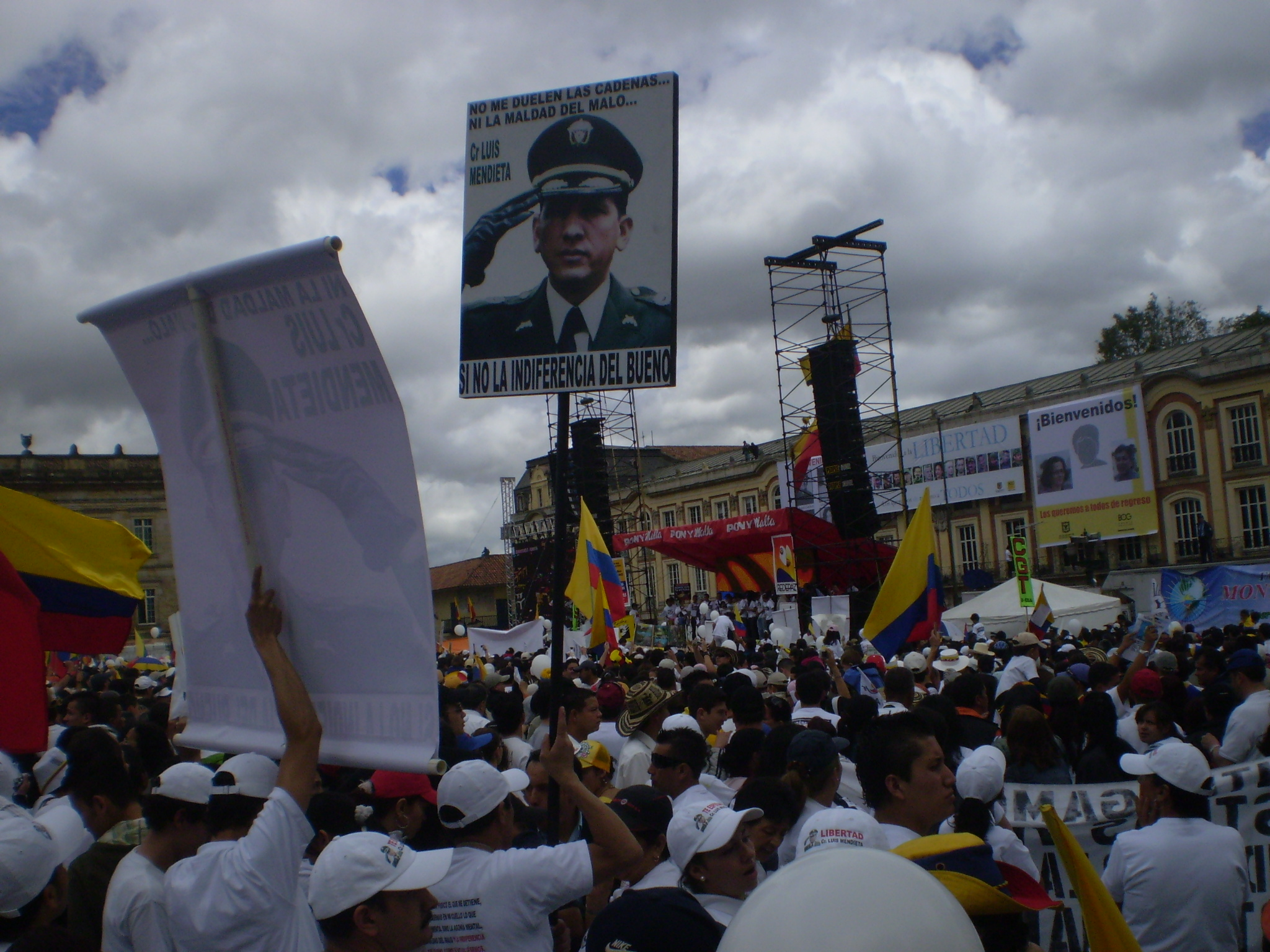 Marcha 20 de julio - Plaza de Bolívar Luis Mendieta Foto: Paola Vargas / equinoXio